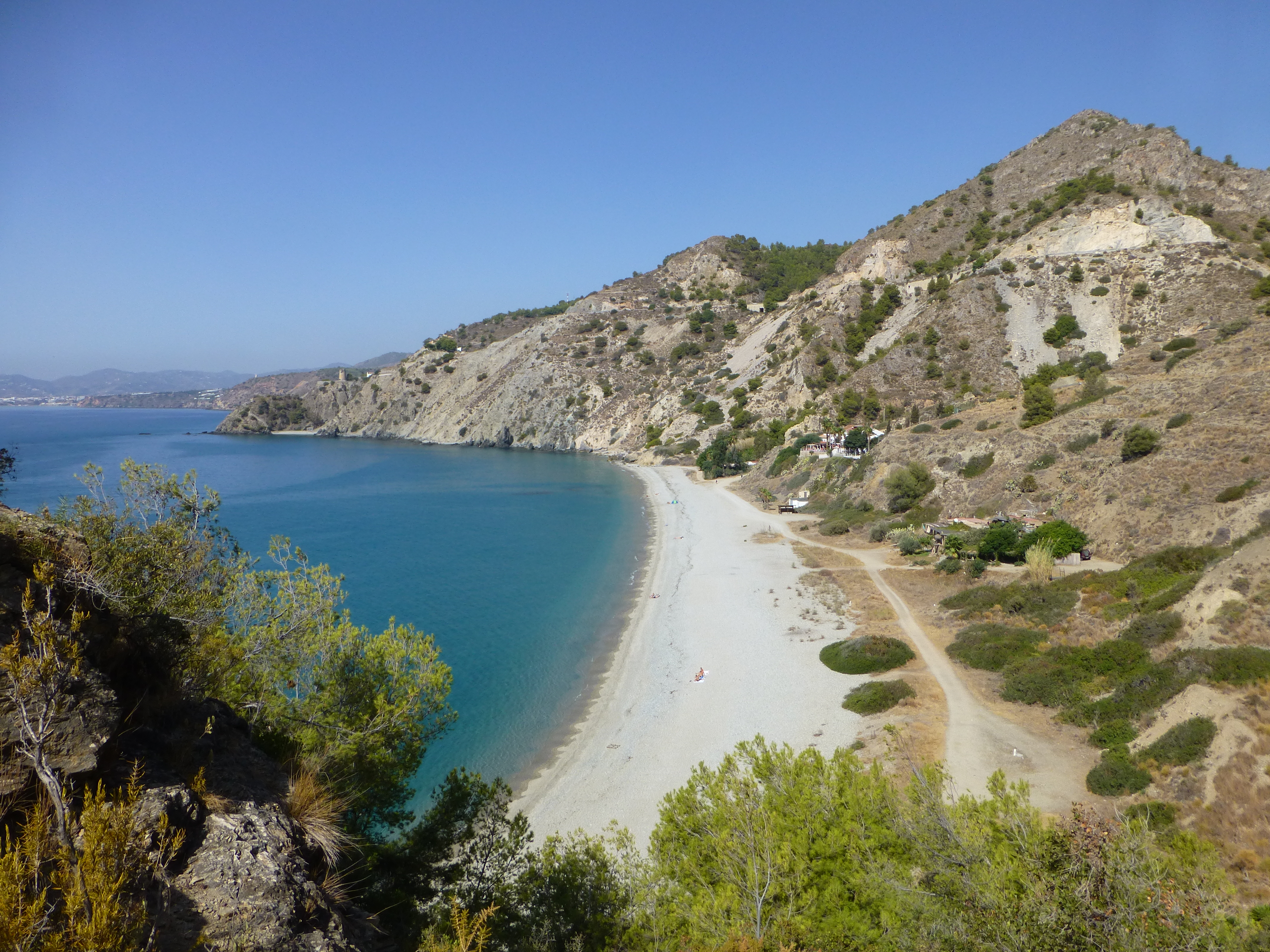 La Cala del Cañuelo vista desde el SE. Nerja, Cádiz, Andalucía, España.